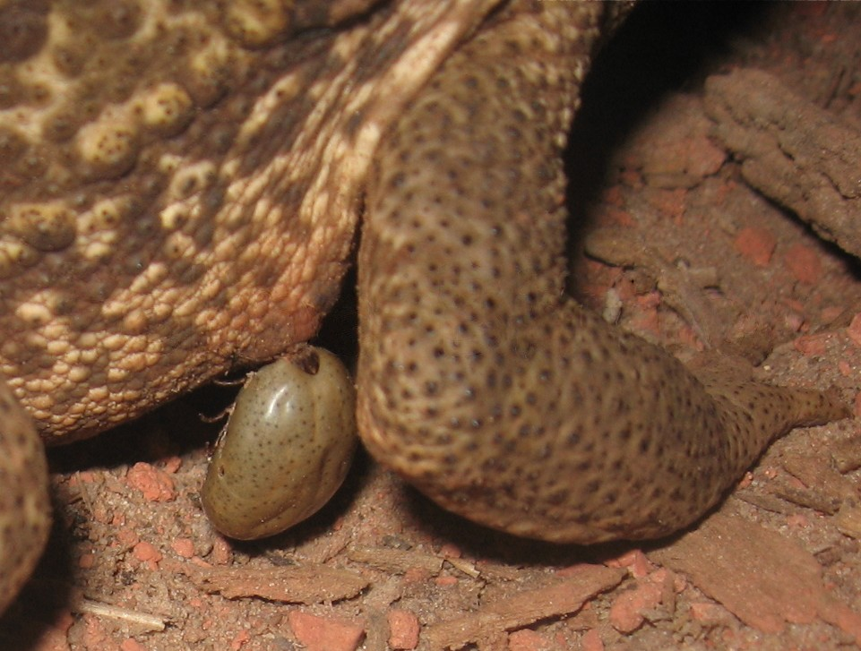 Bufo schneideri